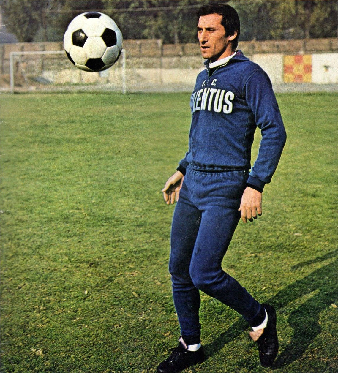 Il calciatore italiano Giuseppe Furino in allenamento alla Juventus nel 1974.